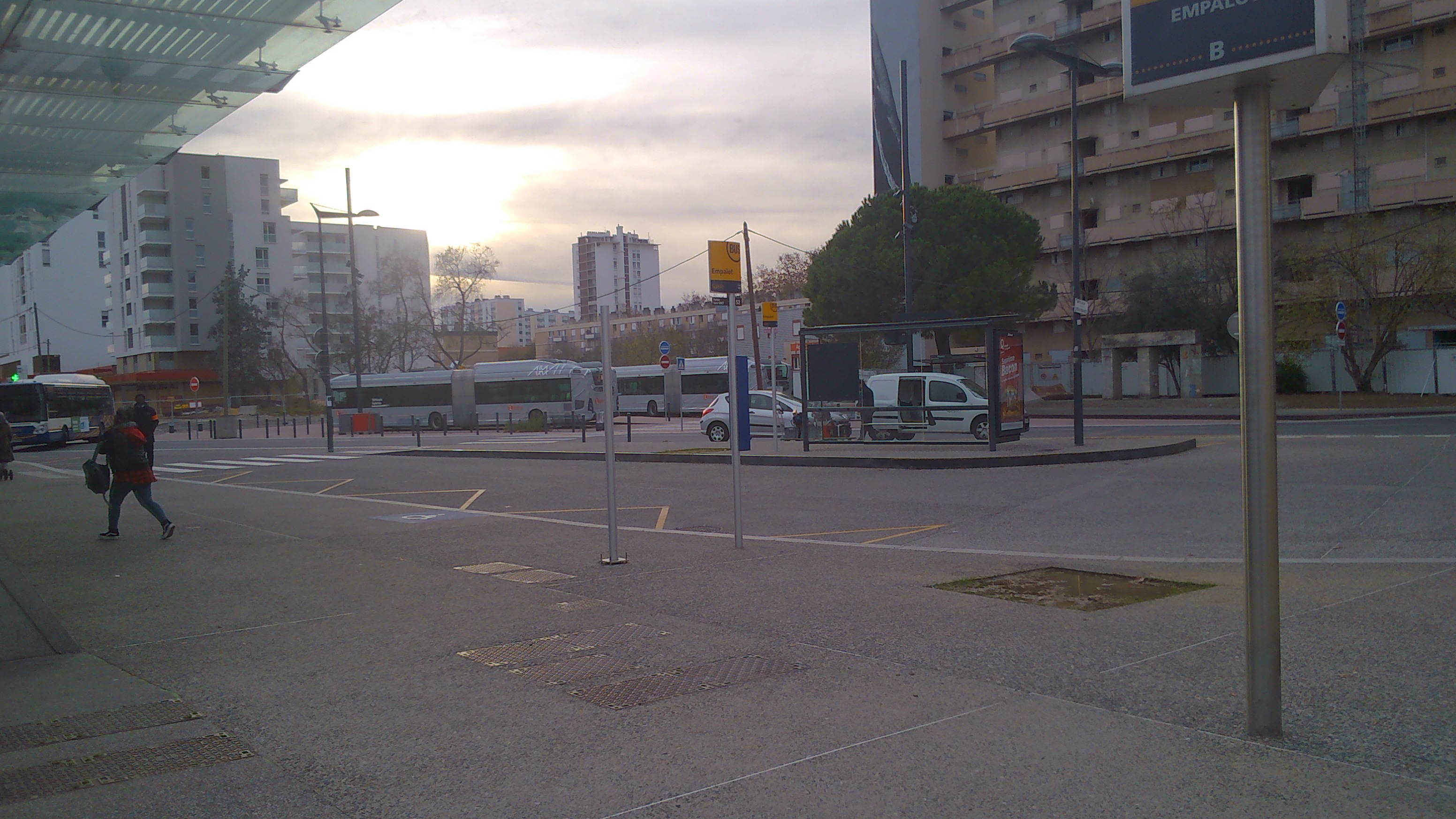 Gare routière de la station Empalot de la ligne B du métro de Toulouse